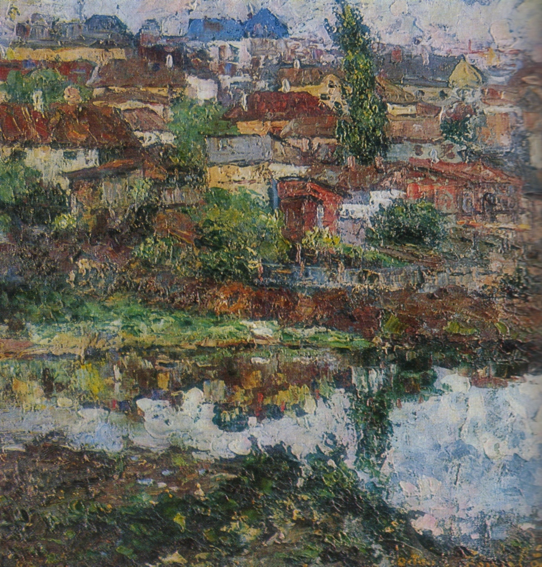 Mahalaua din Pacurari